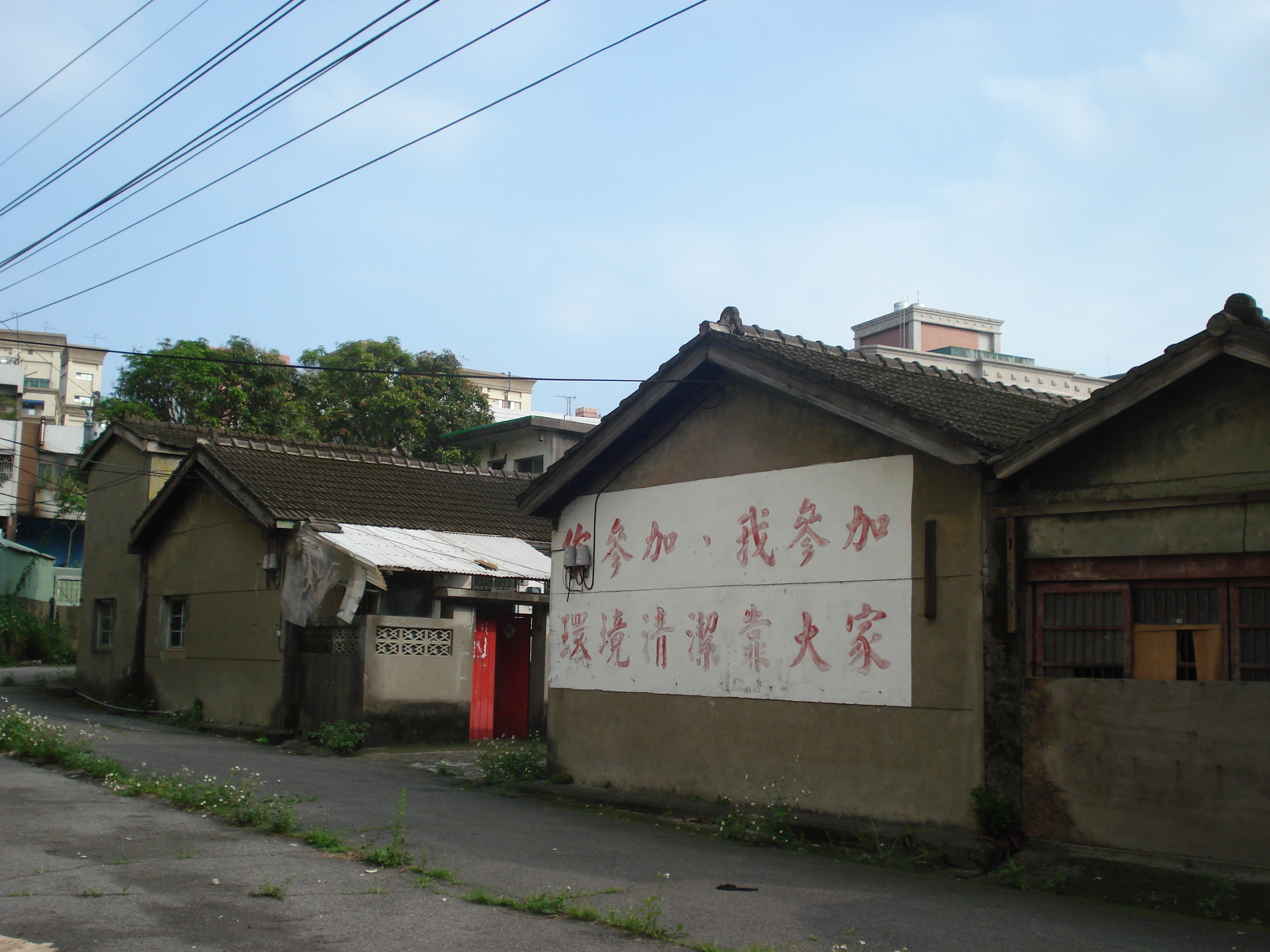 台灣眷村－憲光二村；攝於2008年5月。